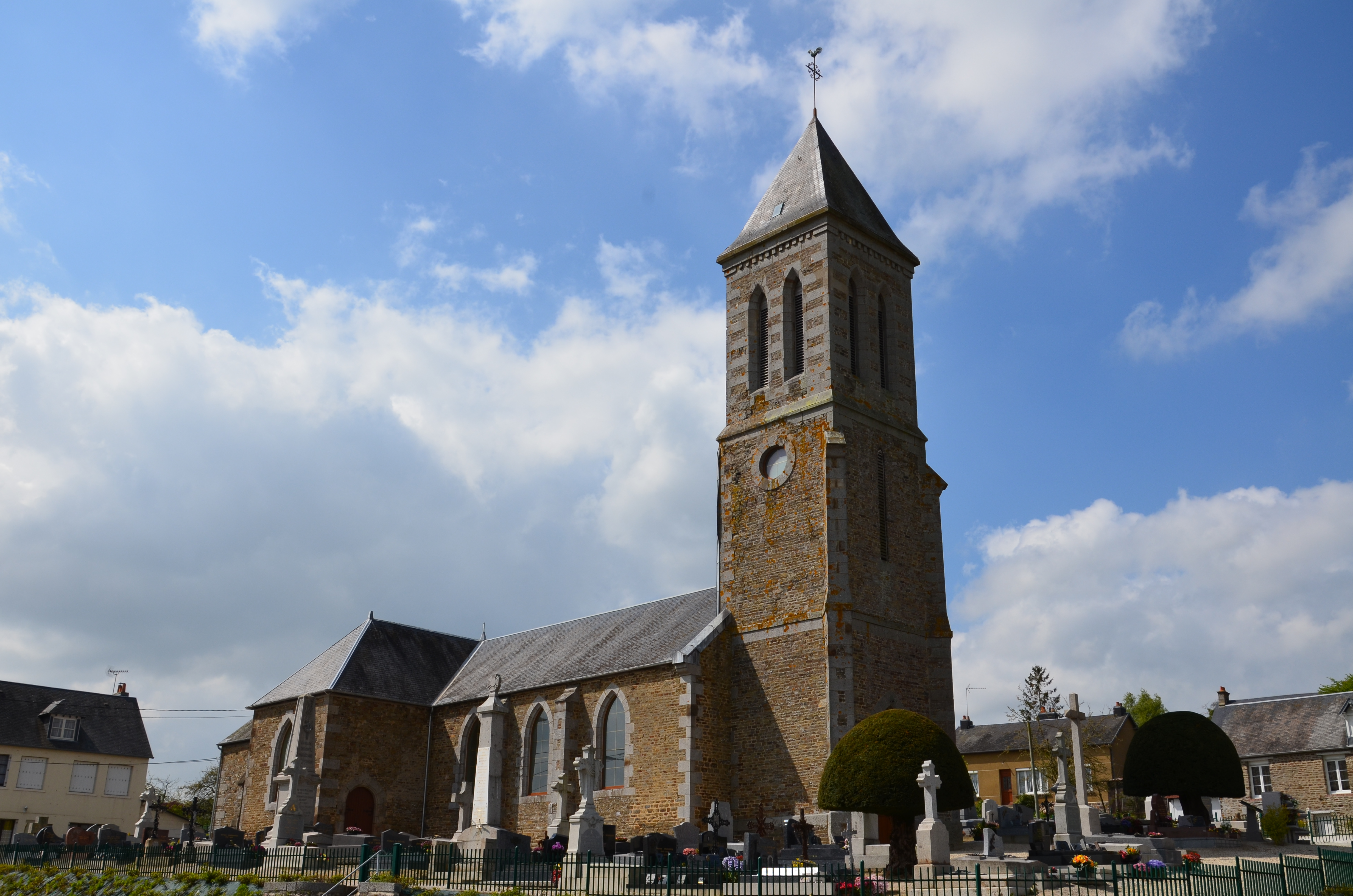 Église Notre-Dame de Presles.